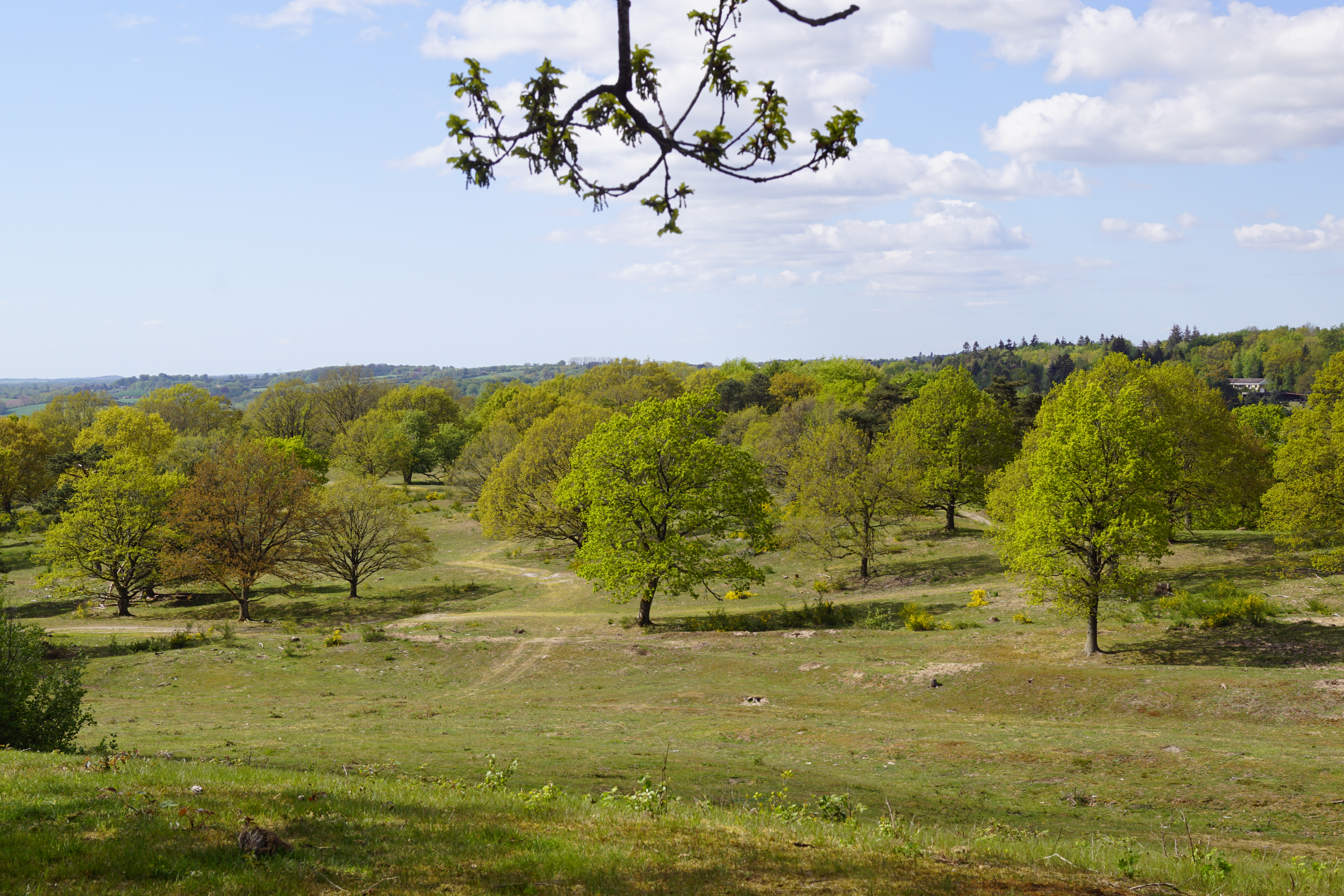 Udsigt i Svanninge Bakker